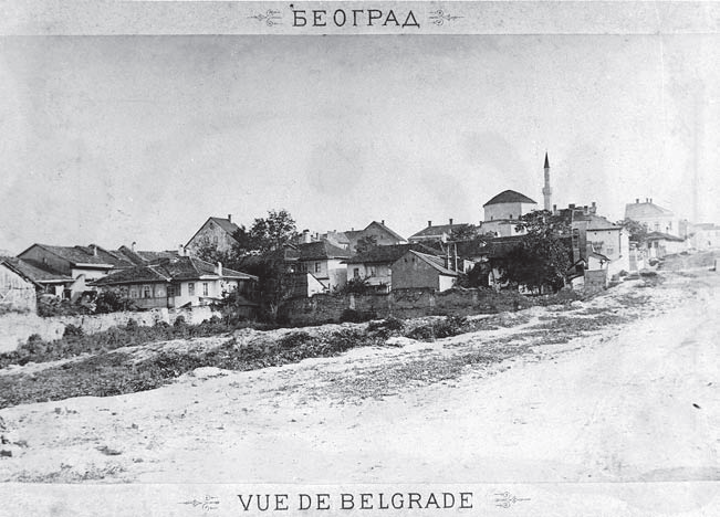 12. Београд око Бајракли џамије, 1895, М.Јовановић, Музеј града Београда